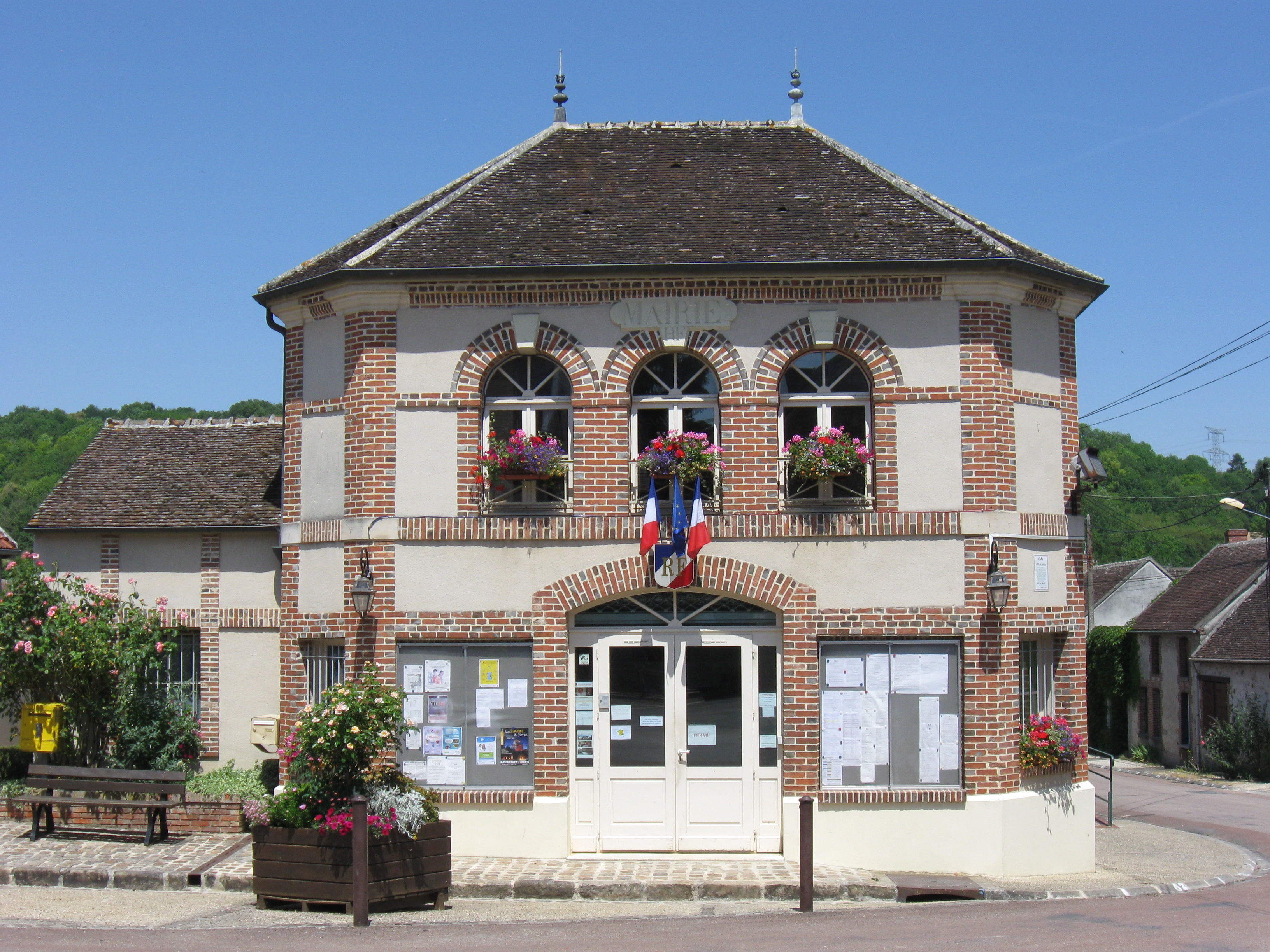 Mairie de Chalautre-la-Grande. (Seine-et-Marne, région Île-de-France).